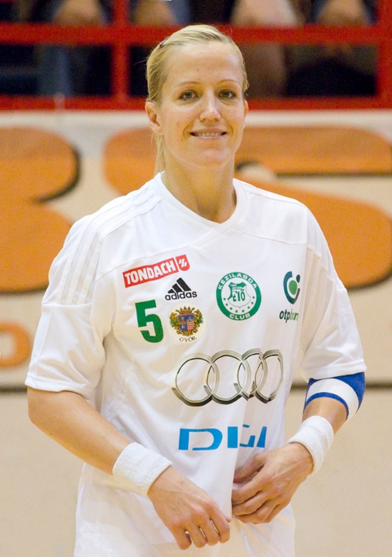 Heidi Løke olimpiai bajnok norvég kézilabdázó.